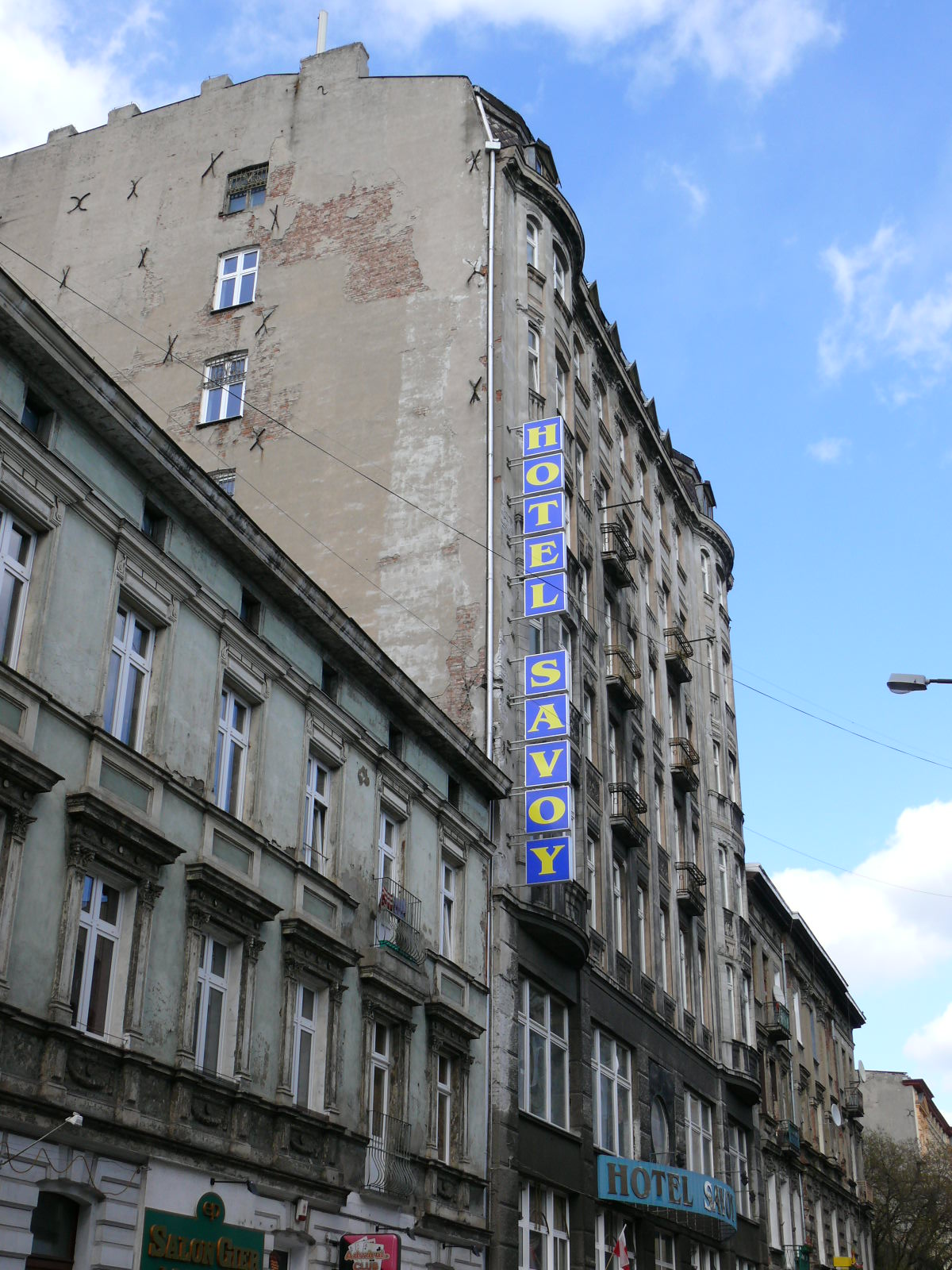 Hotel Savoy w Łodzi